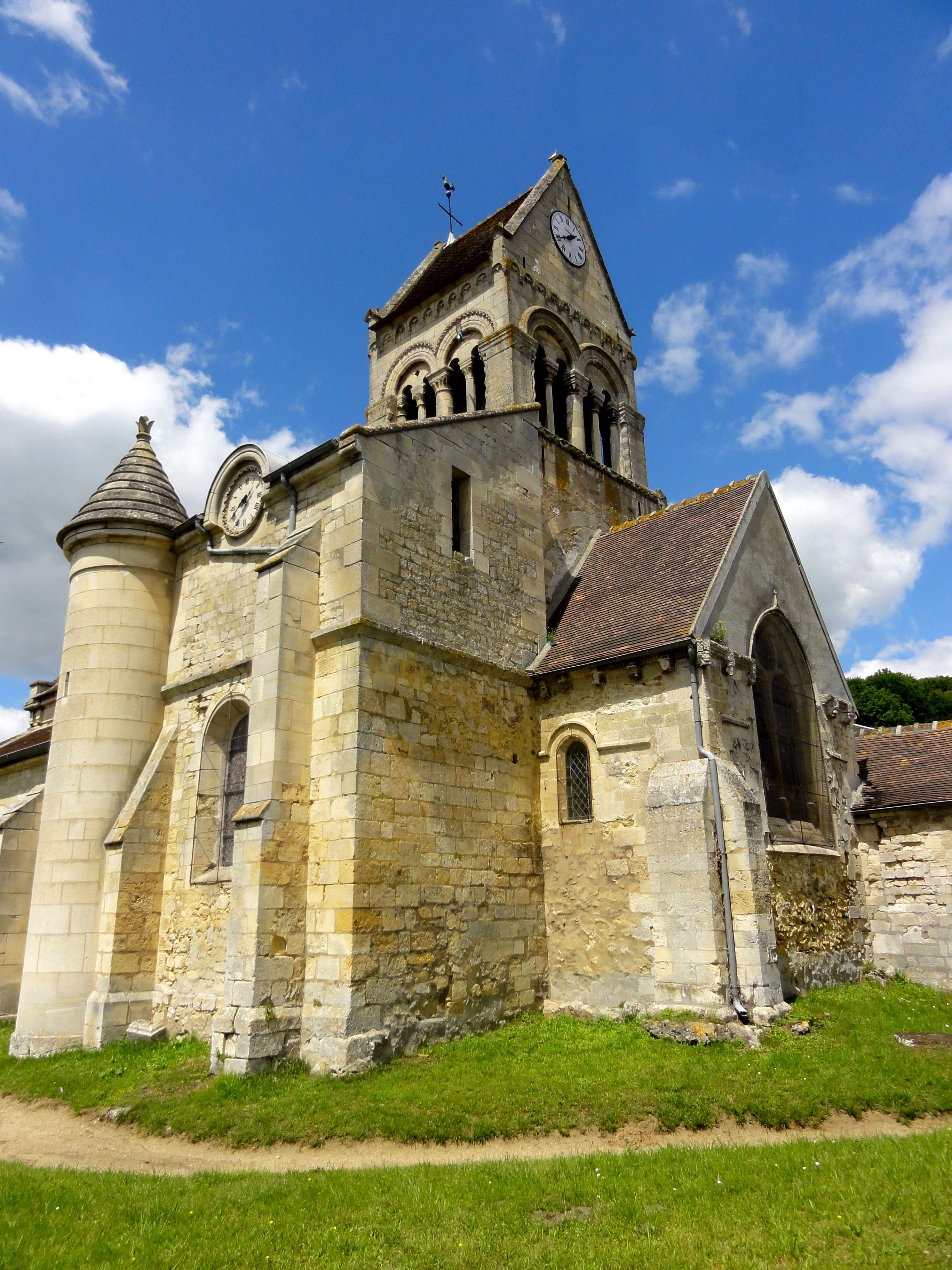 Vue depuis le sud-est.